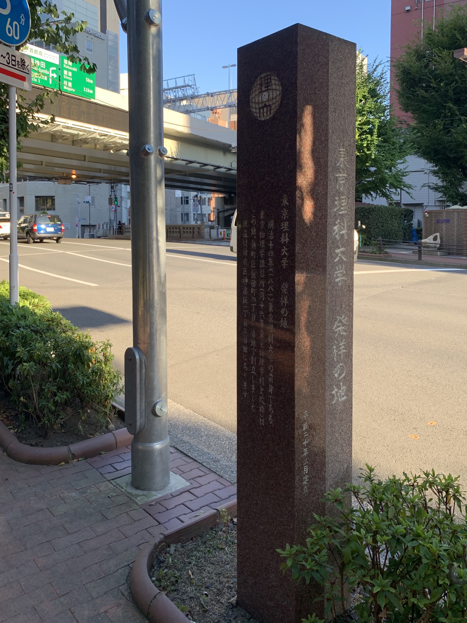 首都高速西神田ランプ近くの「東京理科大学発祥の地」の碑